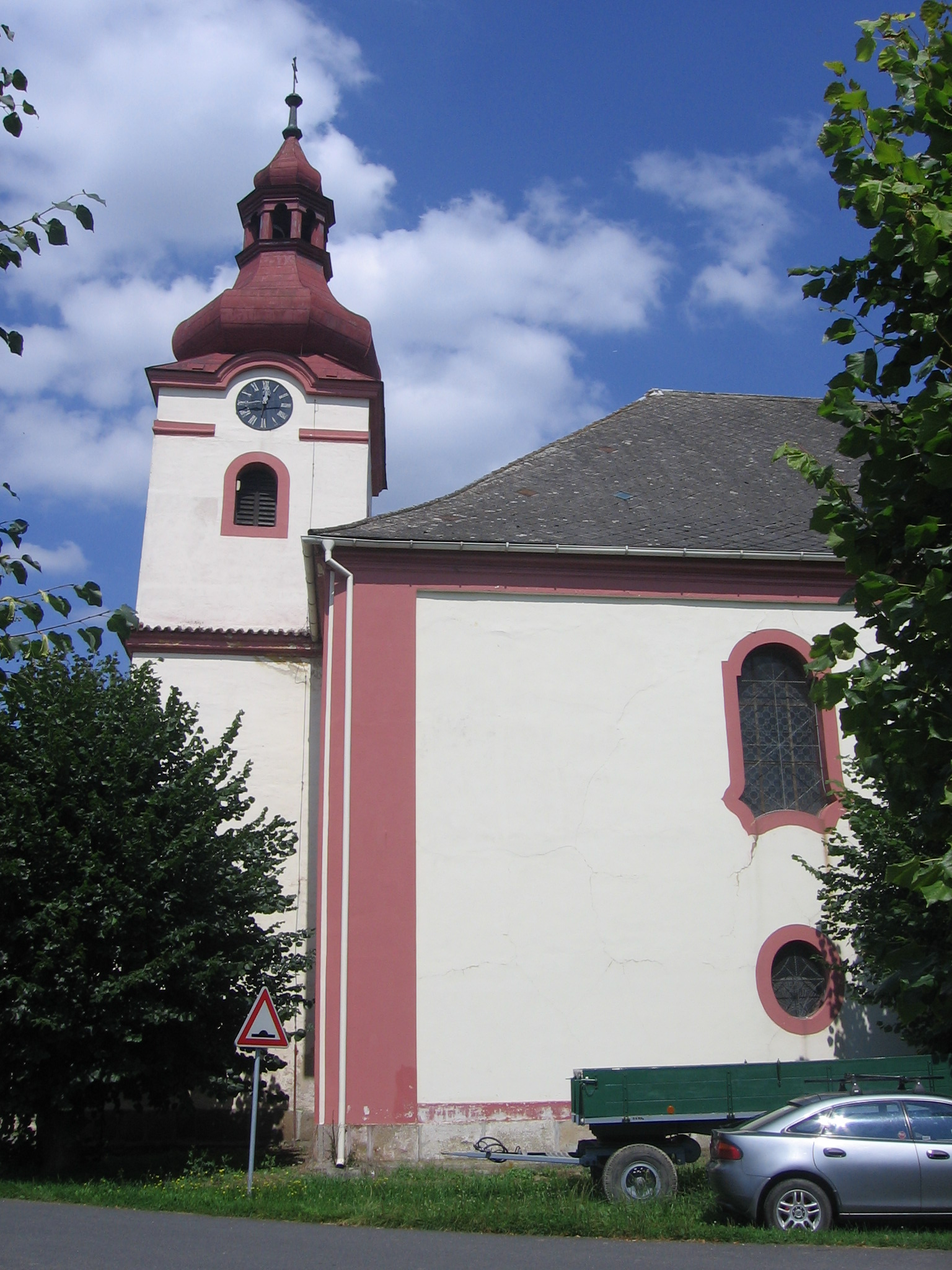 Kostel sv. Petra a Pavla, Dolany, okr.Klatovy